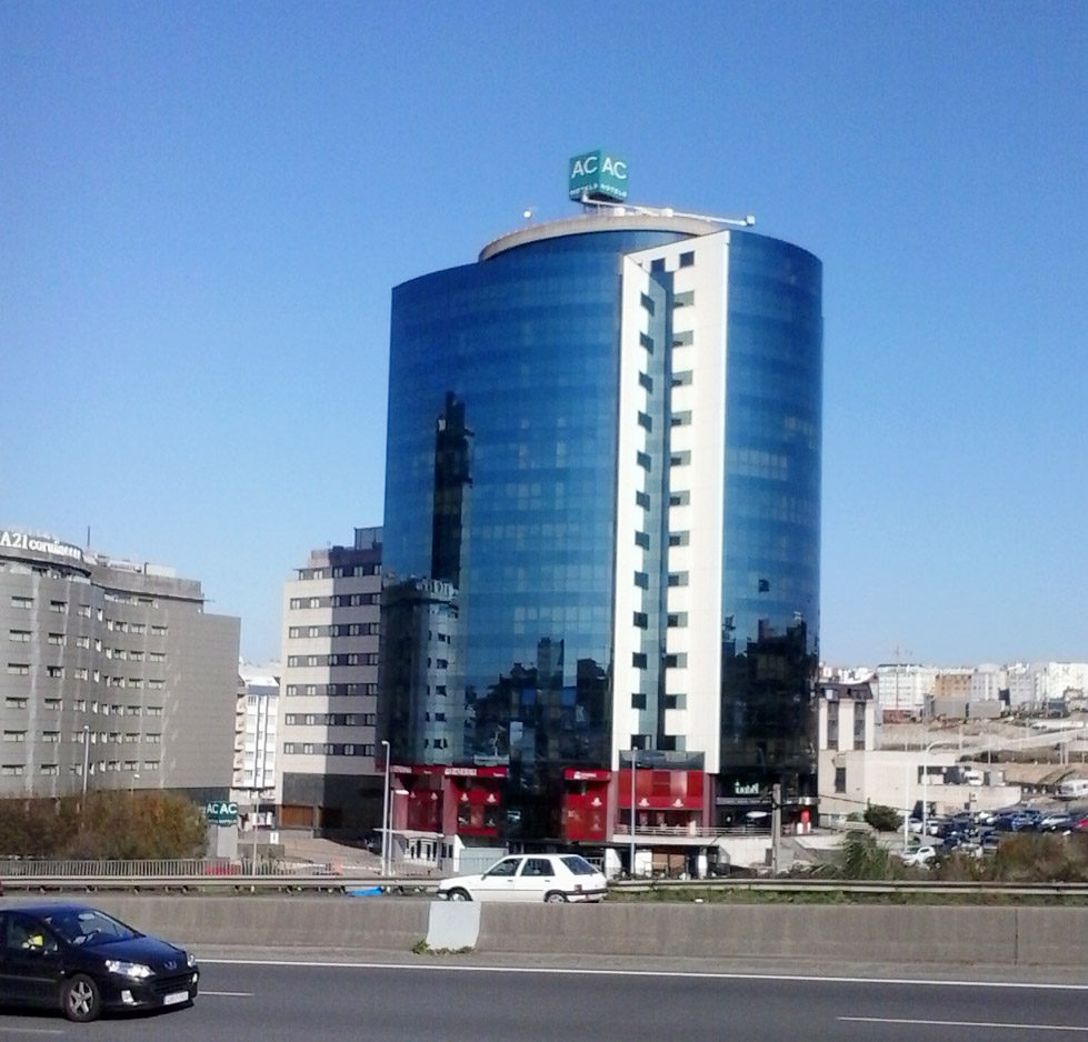 Sede de Intasa na cidade da Coruña